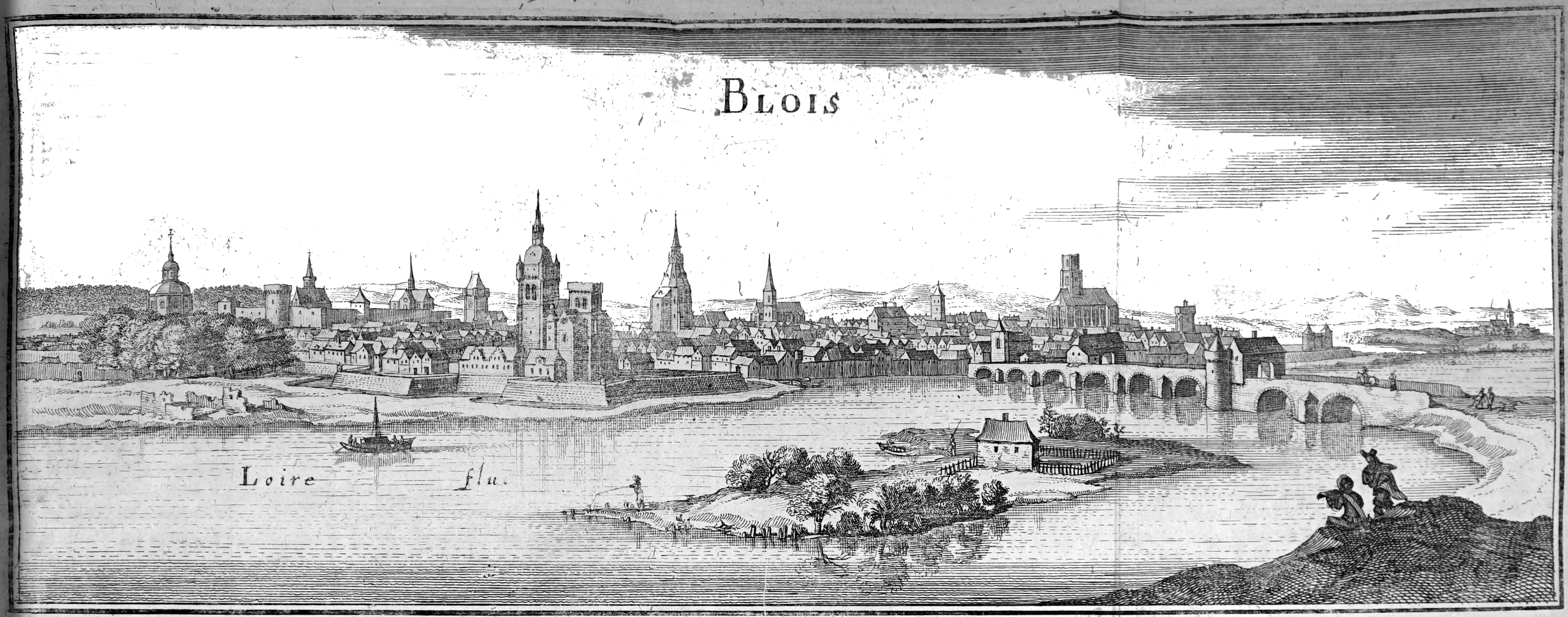 provenant de TOpographiae Galliae.